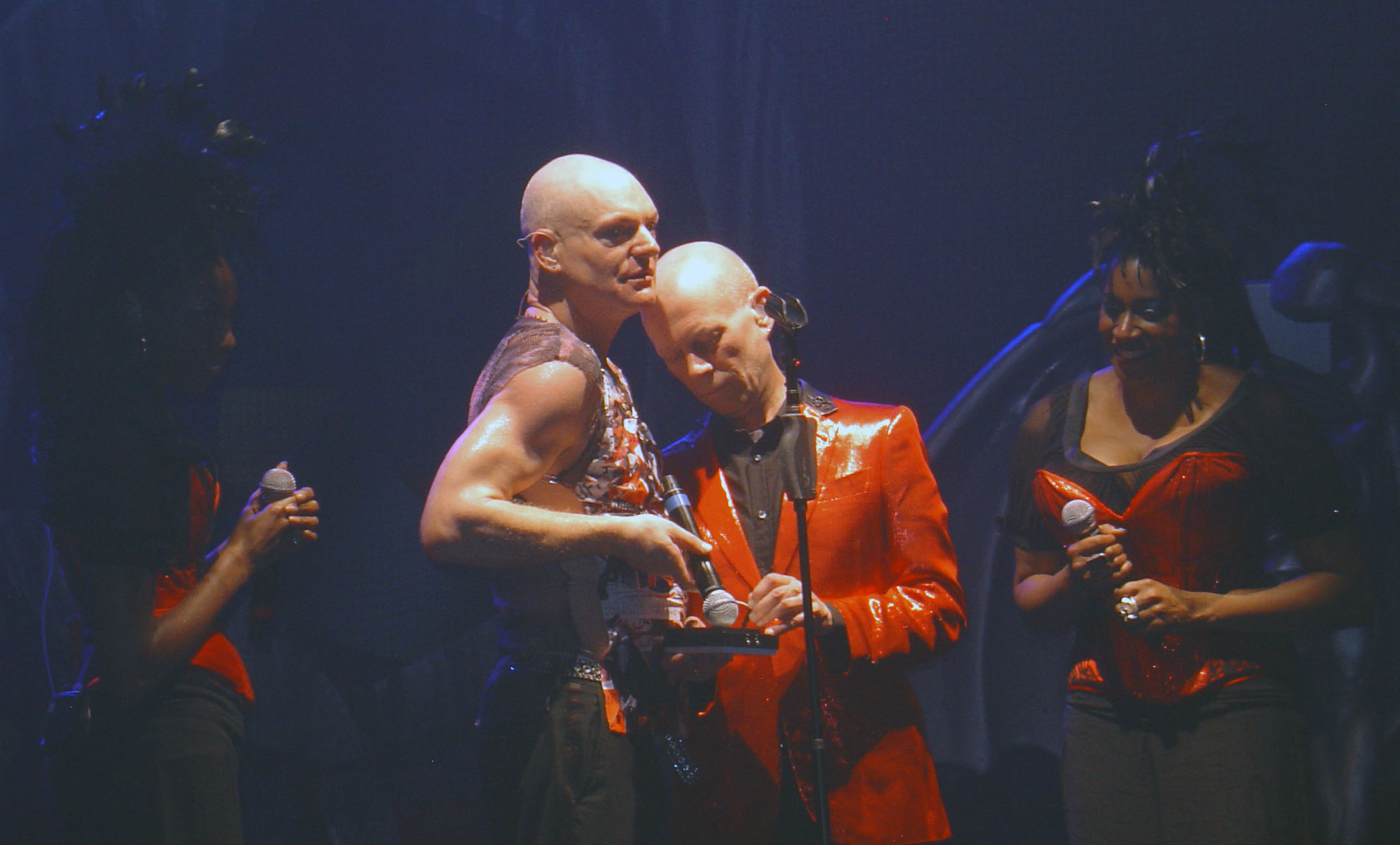 Erasure Konzert 2011 im Alten Schlachthof in Dresden